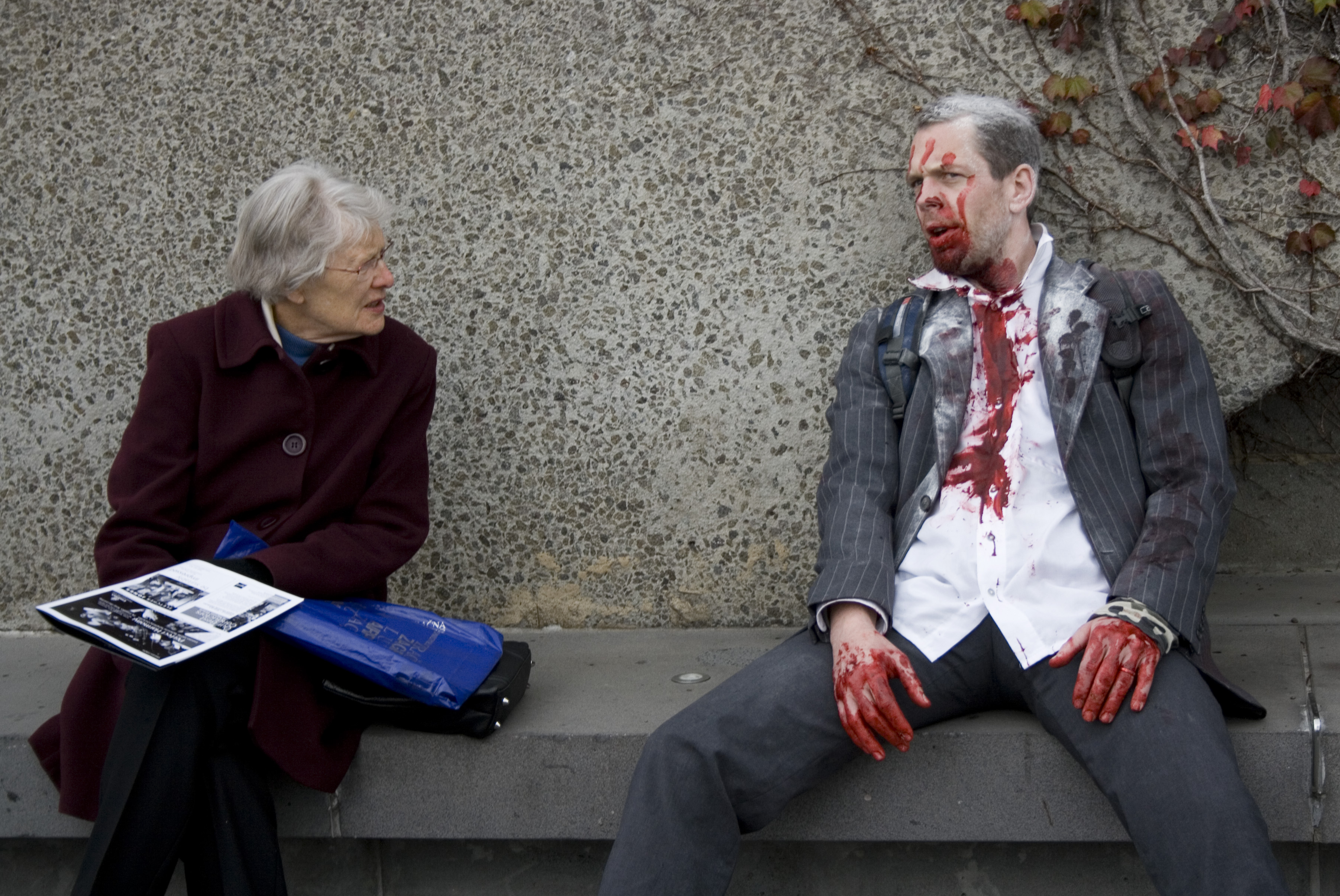 Hanging out @ Melbourne Zombie Shuffle